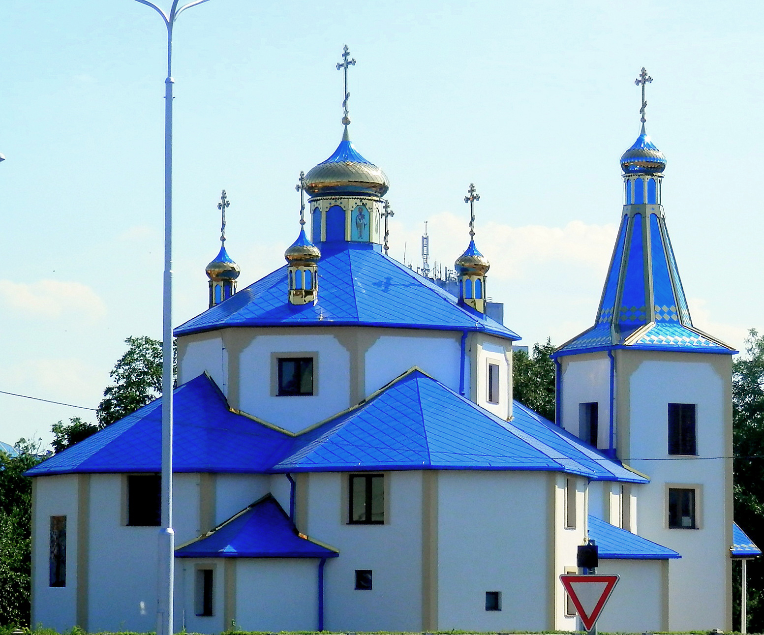 Katedrálny pravoslávny chrám svätých Cyrila a Metoda, mesto Michalovce, historický región Zemplín.